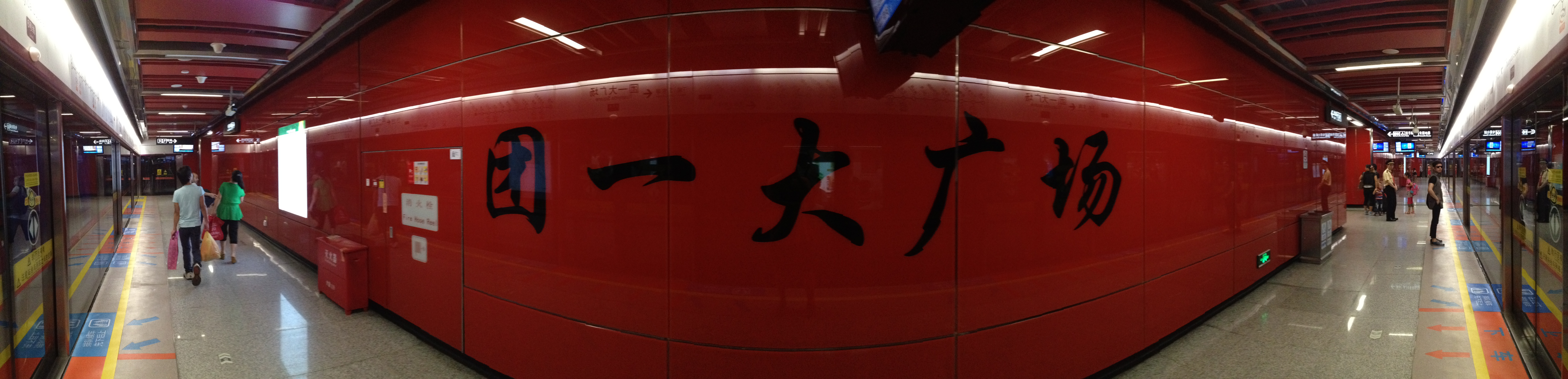 广州地铁团一大广场站月台全景图